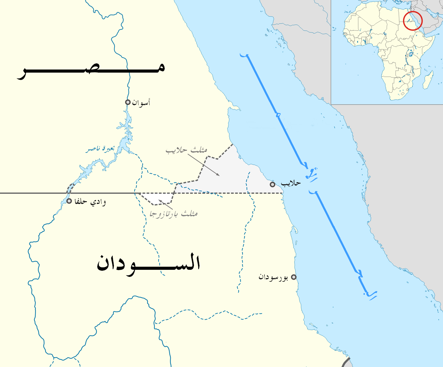 خريطة موقع مثلثي حلايب وبارتازوجا